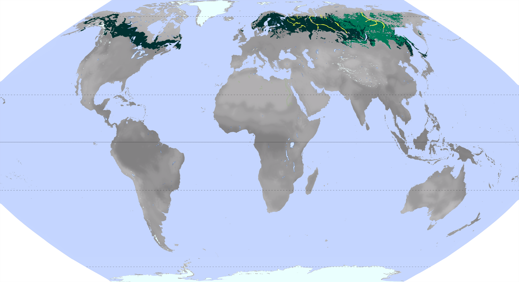 === quellen == Auszug der Wikimedia-Karte Vegetationszonen.png, ebenfalls mein eigenes Werk kartographie Eckert VI-Projektion (nahezu flächentreu, realistische Größenverhältnisse, relativ wenig verzerrt), erstellt mit (Lizenz CC-BY) datengrundlagen → siehe: Literaturangaben der Originalkarte legende (german) Die verwendeten Farben entsprechen nicht der Legende der Originalkarte! Die Modifikation wurde vorgenommen, um die Erkennbarkeit der Flächen auf der Vorschaukarte zu erhöhen. Immergrüner borealer Nadelwald Sommergrüner borealer Nadelwald Boreale Laubholz-Auen